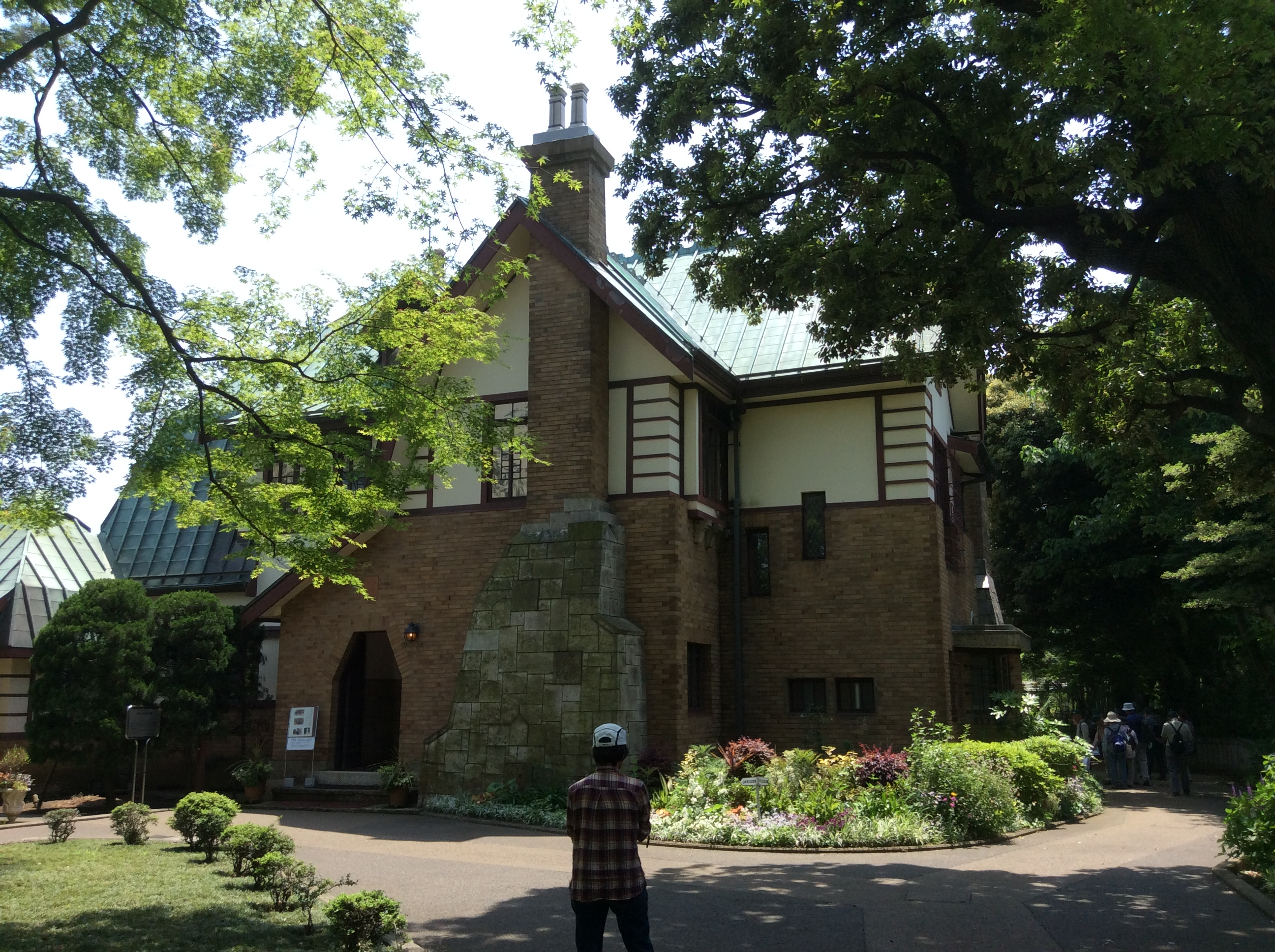 （2015年5月15日撮影）